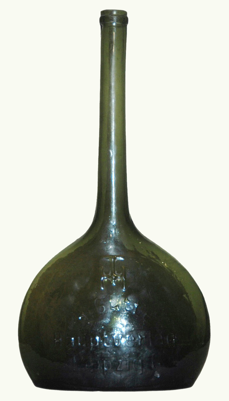 Goseflache um 1900, Pressglas 33cm.